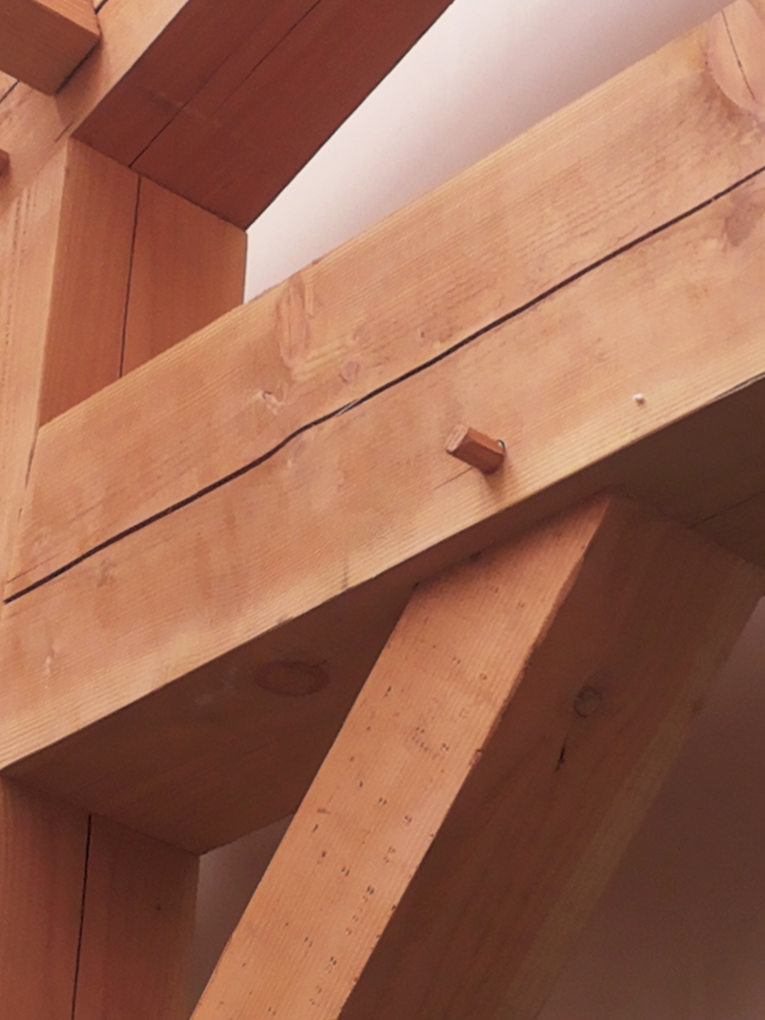 Ronde pen en gat verbinding